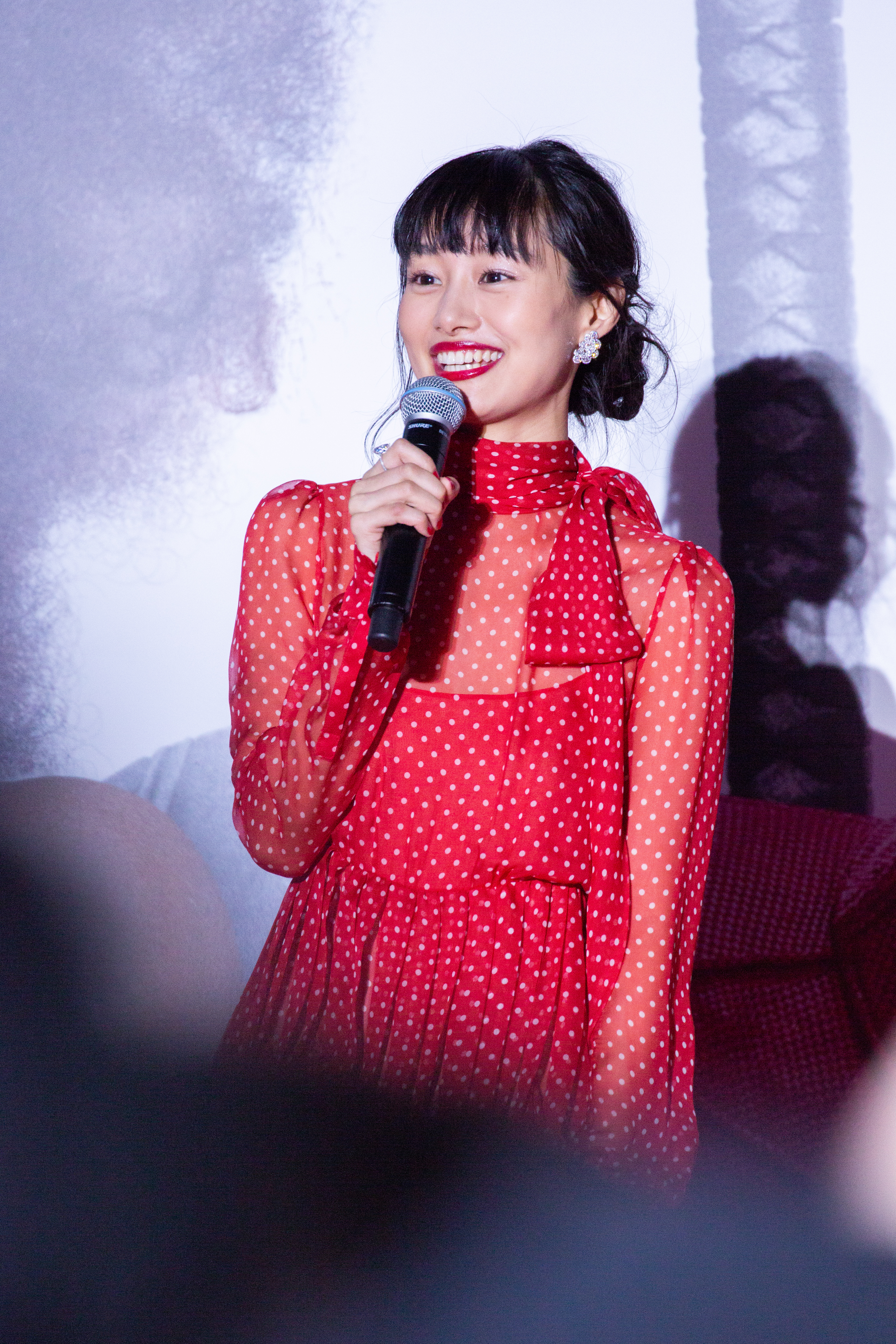 デッドプール2 ジャパン・プレミア レッドカーペット 忽那汐